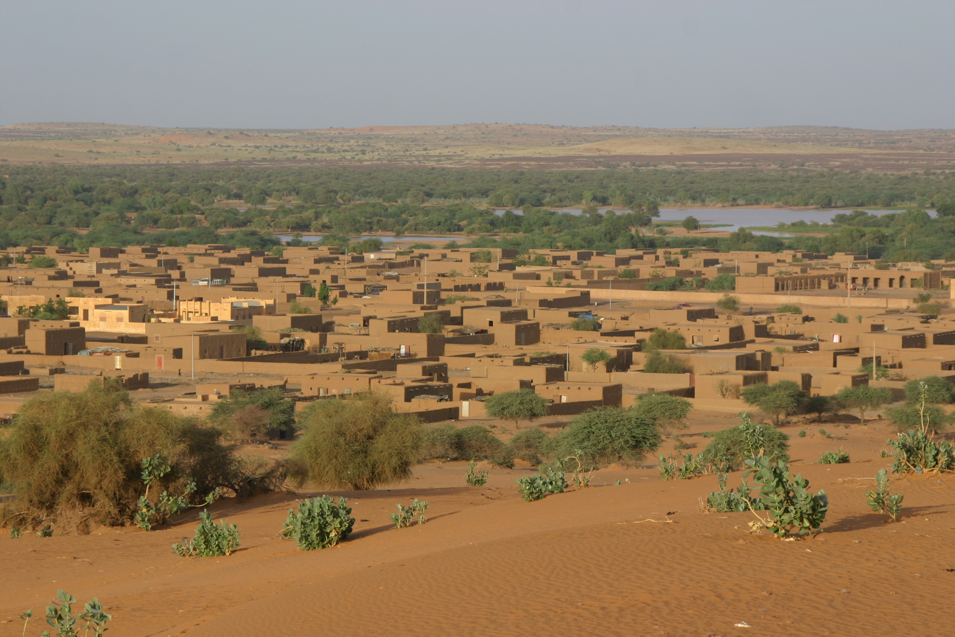 Menaka - mali